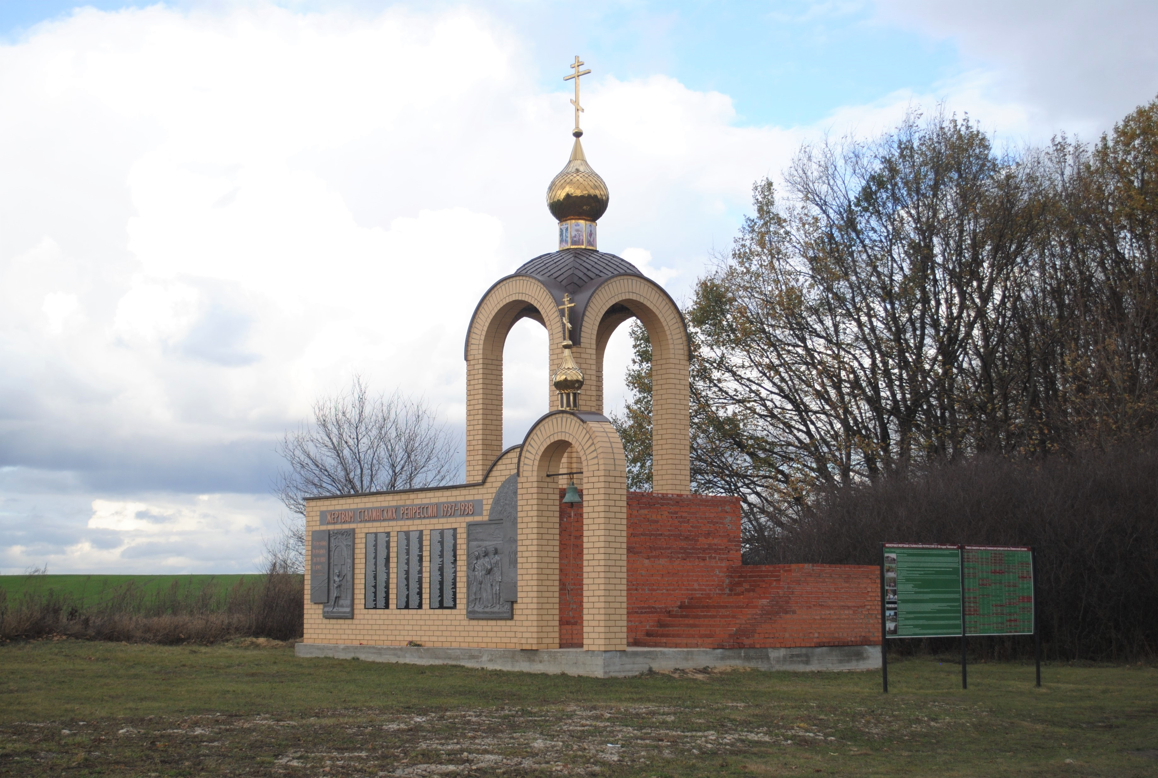 Часовня в Липовчике